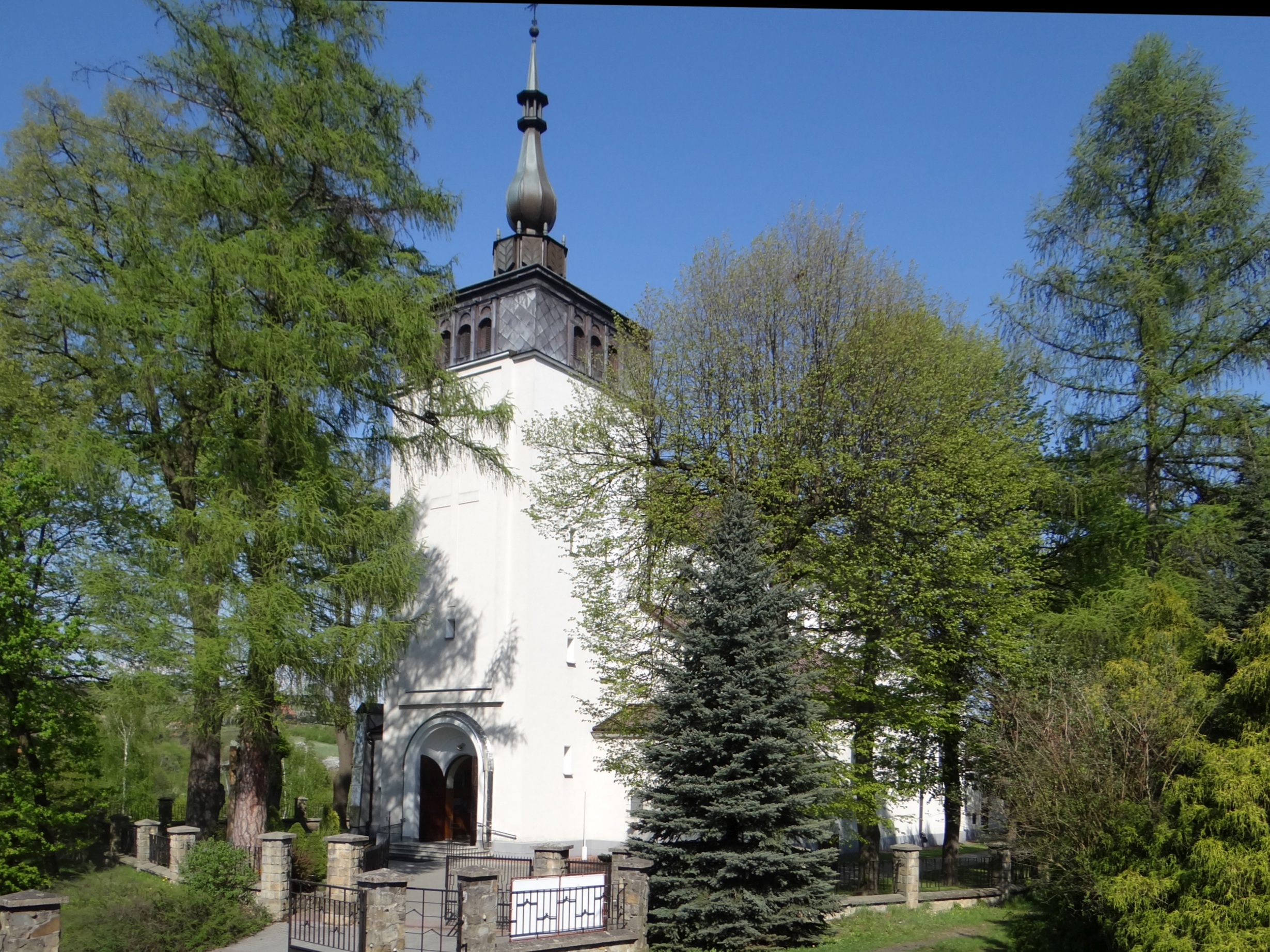 Kościół w Szczepanowicach